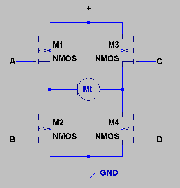 H-Bruecke, elektronische Schaltung